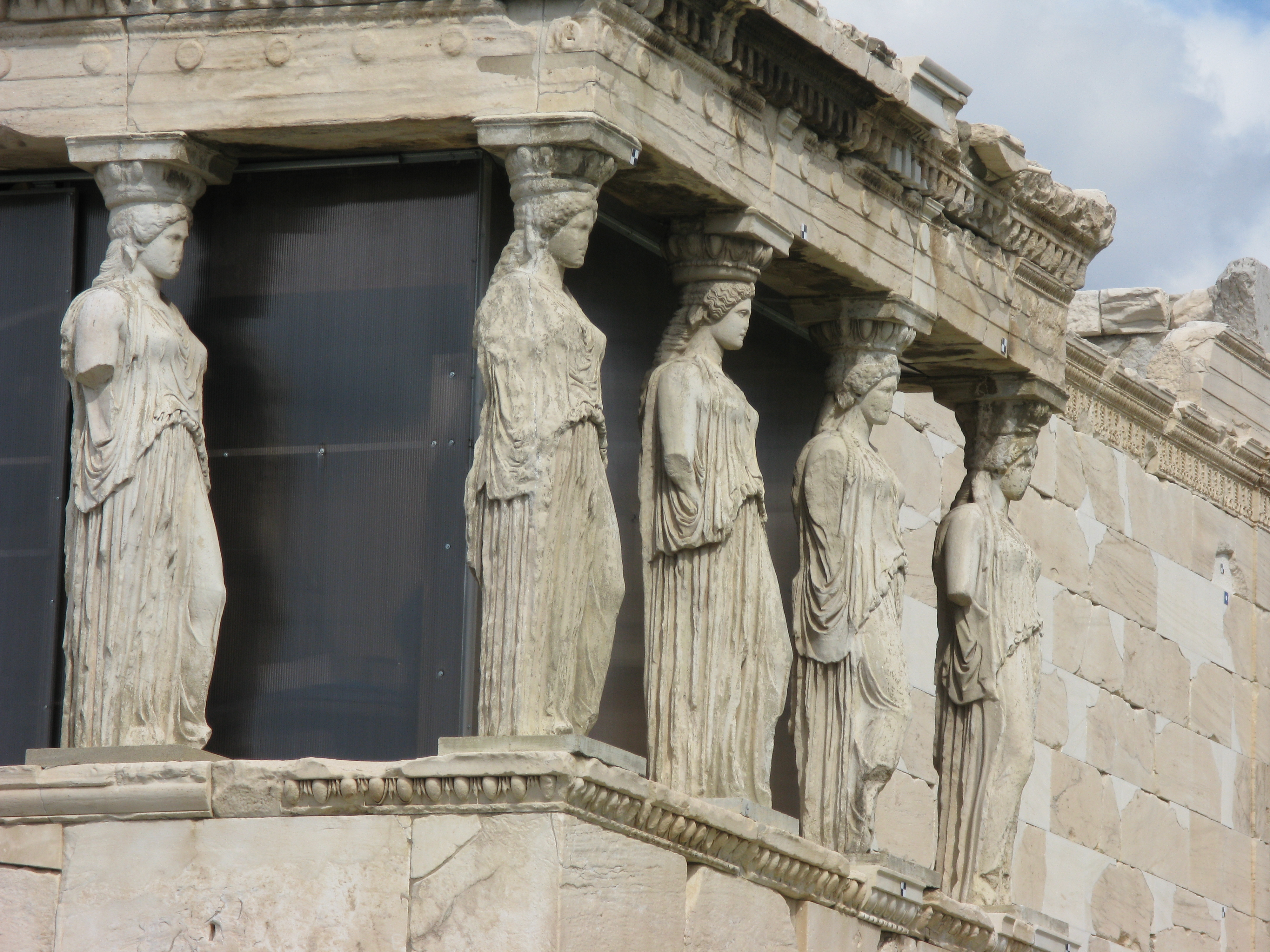 Erechtheum, Acropolis of Athens, Greece. --- «Πρόστασις των Κορών» (Καρυάτιδες) Έρέχθειον, Ακρόπολη. Αθήνα.